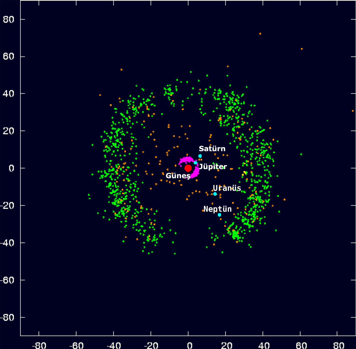 Bilinen tüm Kuiper kuşağı gökcisimlerinin dört dış gezegen ile birlikte görüntüsü. Lejand Kırmızı = Güneş Buz mavisi = Dev gezegenler Yeşil = Kuiper kuşağı Turuncu = Scattered disc object or Centaur Pembe = Jüpiter'in truvalı göktaşları Sarı = Neptün'ün truvalı göktaşları